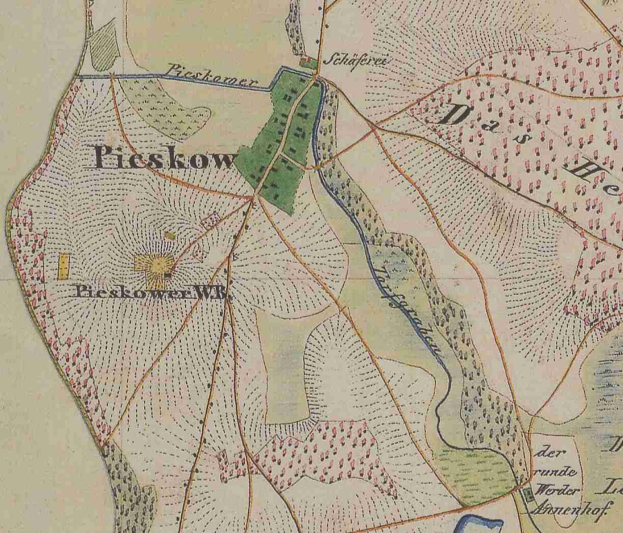 Ortsteil Pieskow, Stadt Friedland, Landkreis Oder-Spree, Brandenburg, Deutschland, Ausschnitt aus dem Urmesstischblatt 3951 Trebatsch von 1846